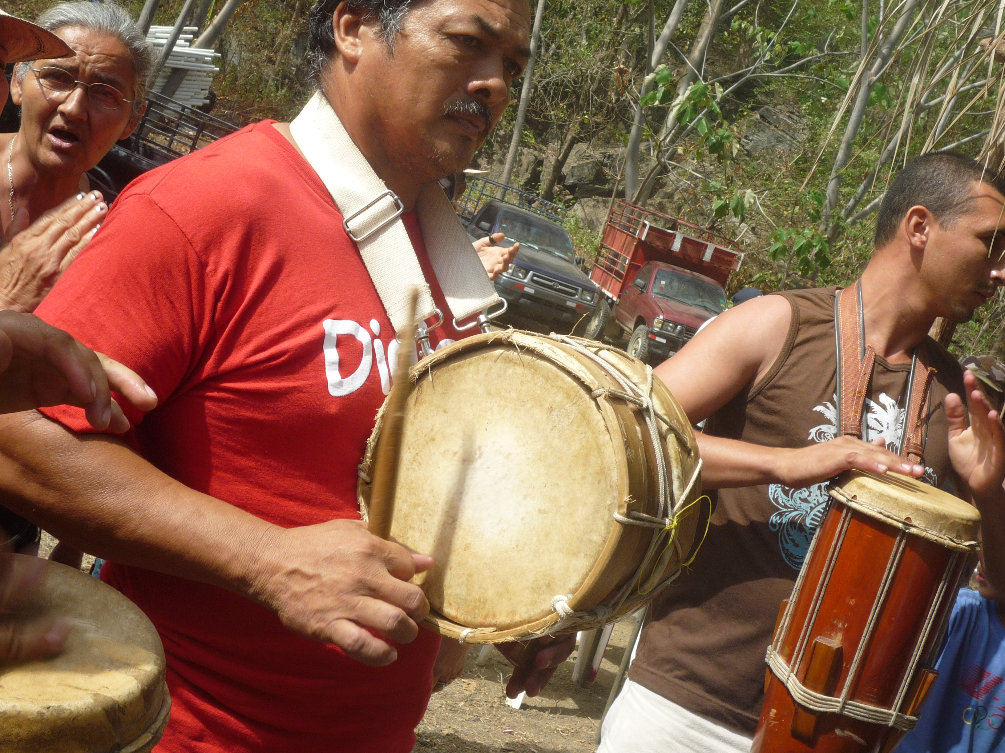 Grupo de indígenas celebrando una festividad folklórica con instrumentos típicos.